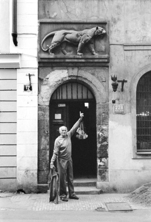 Bohumil Hrabal az Aranytigris előtt (Prága, 1987)